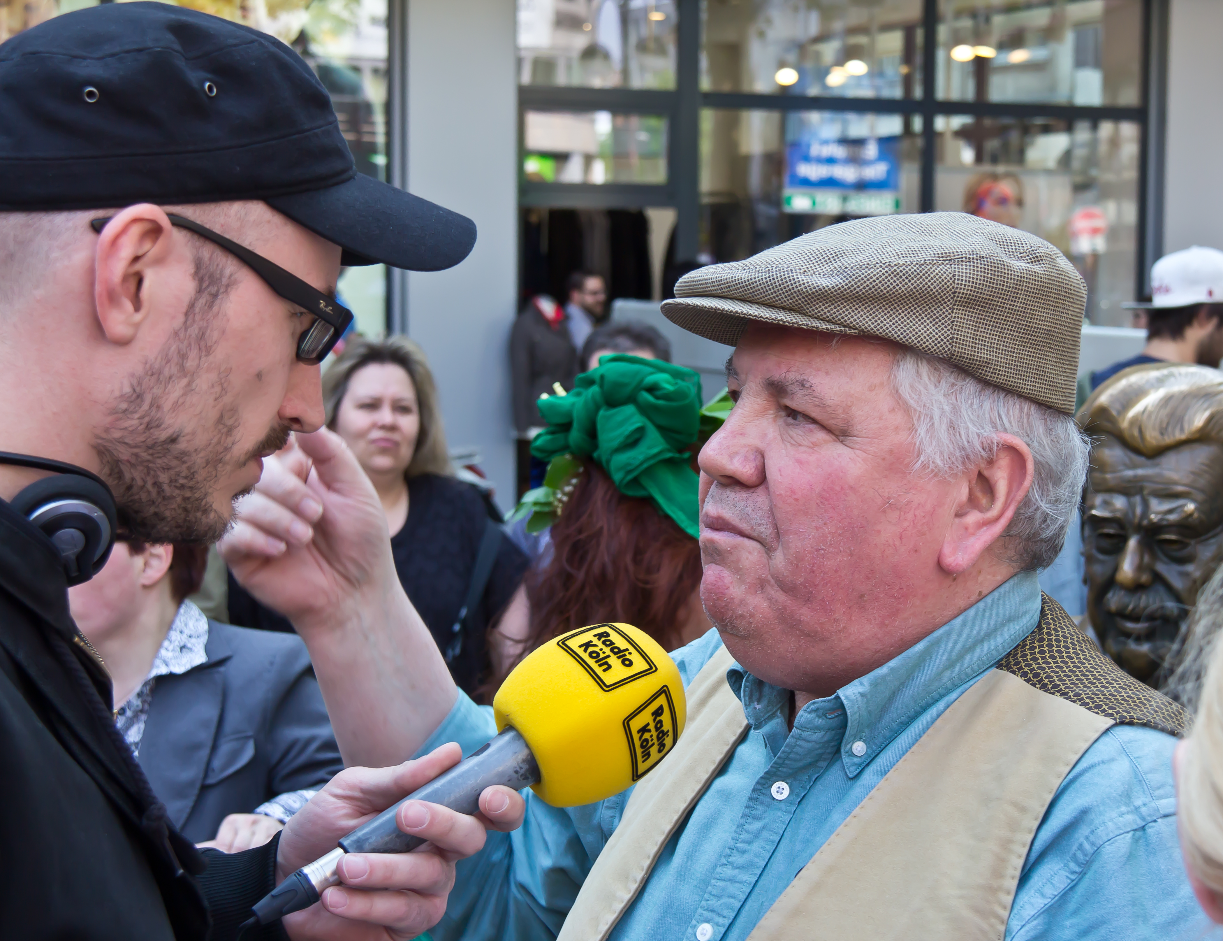 Enthüllung des Willy-Millowitsch-Denkmals auf dem Willy-Millowitsch-Platz (nach dem Umzug vom Eisenmarkt) durch Bürgermeisterin Elfi-Scho-Antwerpers, Peter Millowitsch und Bezirksbürgermeister Andreas Hupke (Stadtbezirk Köln-Innenstadt) Foto: Peter Millowitsch wird von Radio Köln interviewt